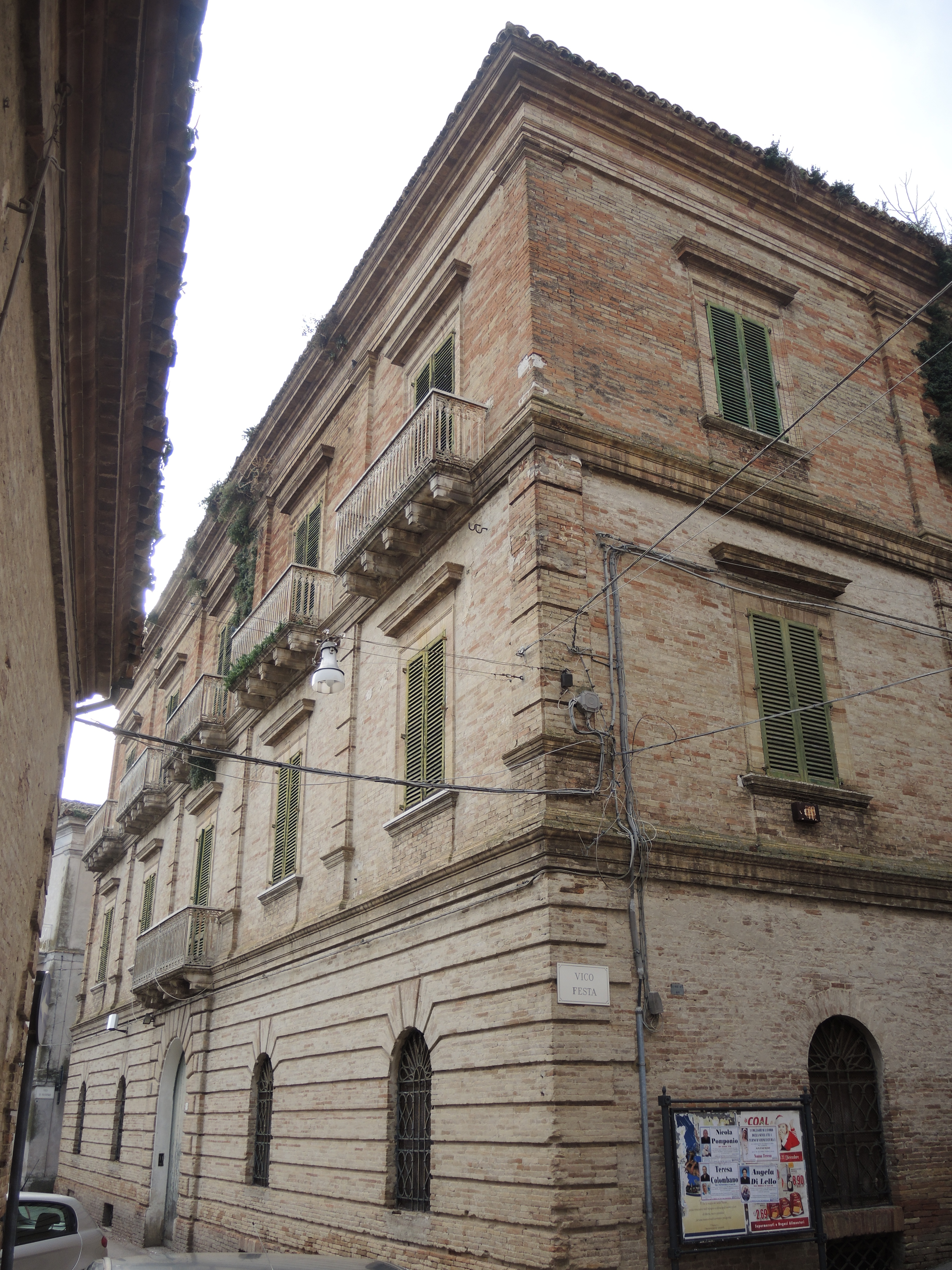 Monteodorisio